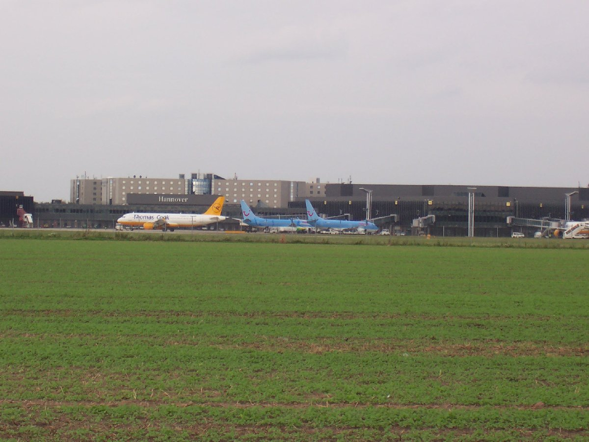 Termnial C des Flughafens Hannover-Langenhagen mit dem Maritim Hotel im Hintergrund.